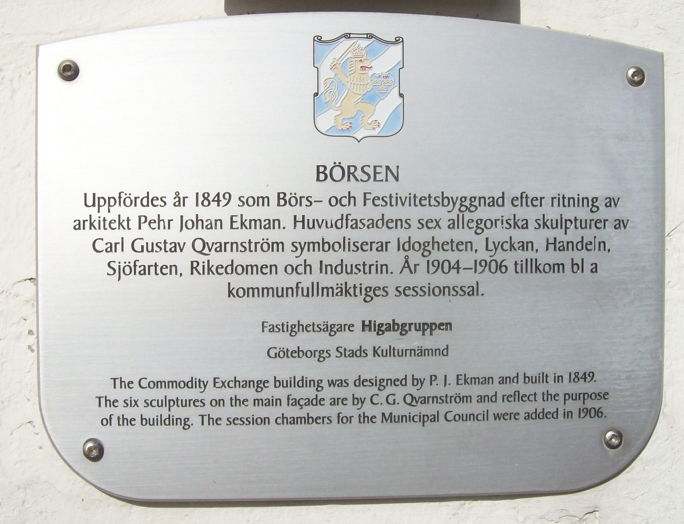 Nordstaden 16:2 Hus 1a, Börsen. fd börshus, Rådhus. Göteborg Plaketten sattes upp som en del av Göteborgs stads kulturnämnds "Projekt Husmärkning" kring åren 2000-2001 där drygt etthundra skyltar ingick. Se även boken "100 utmärkta hus i Göteborg". Vid en inventering av kommunen gjord 2016 satt 69 skyltar fortfarande uppe.